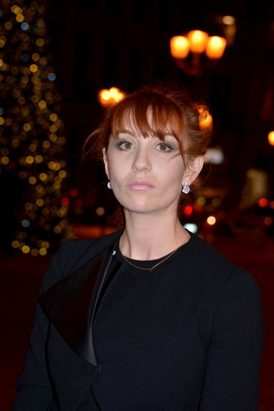 Lolita Chammah au dîner des révélations des César du cinéma